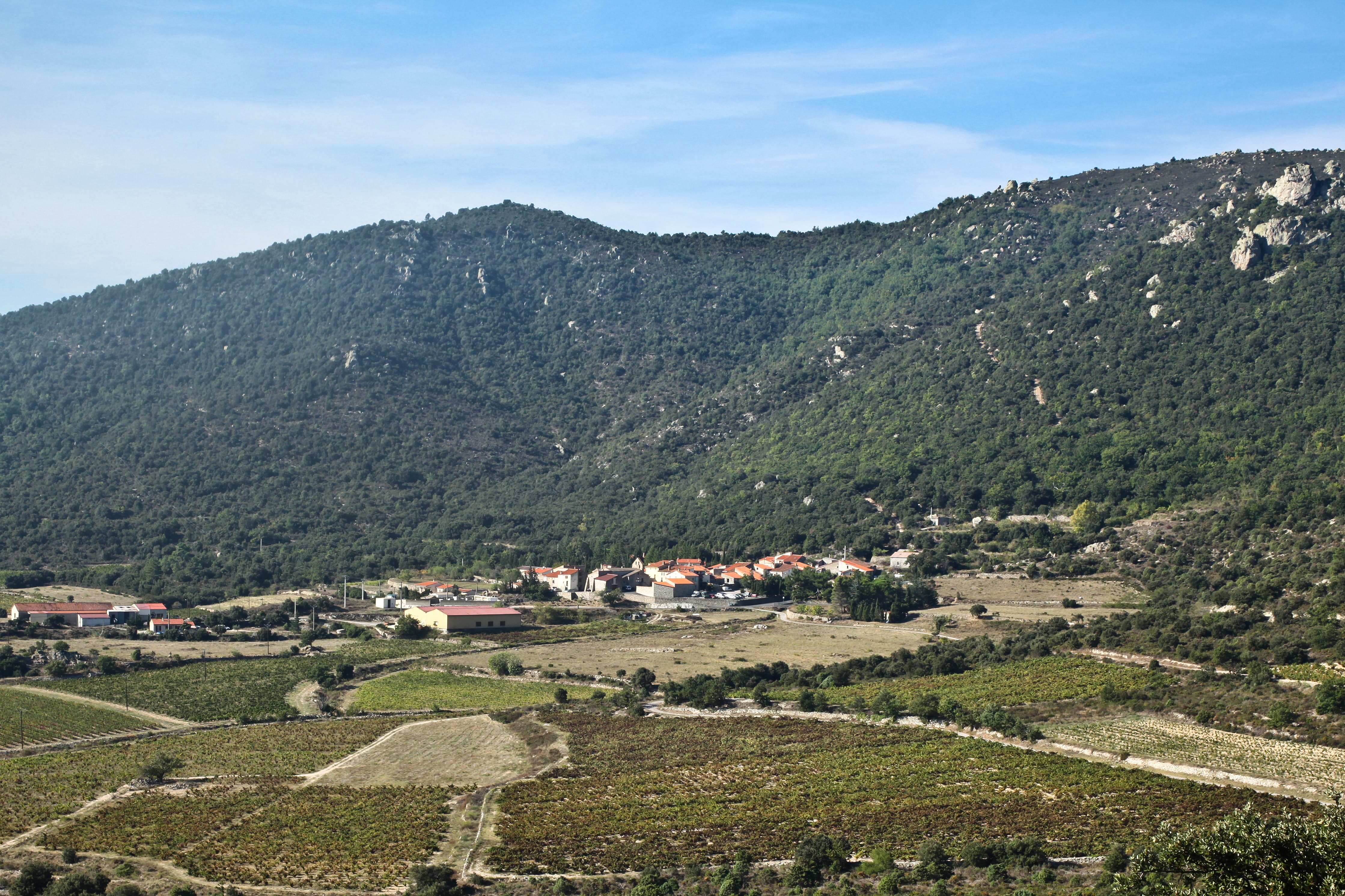 Village de Tarerach